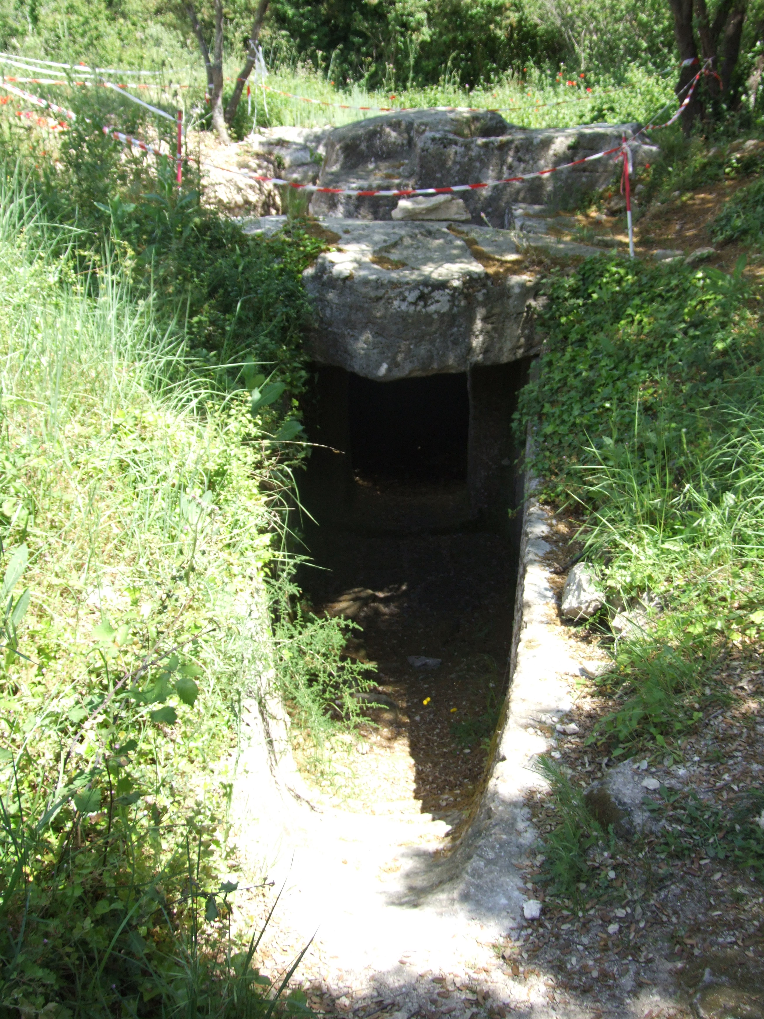 Entrée de l'hypogée du Castelet à Fontvieille, Bouches-du-Rhône